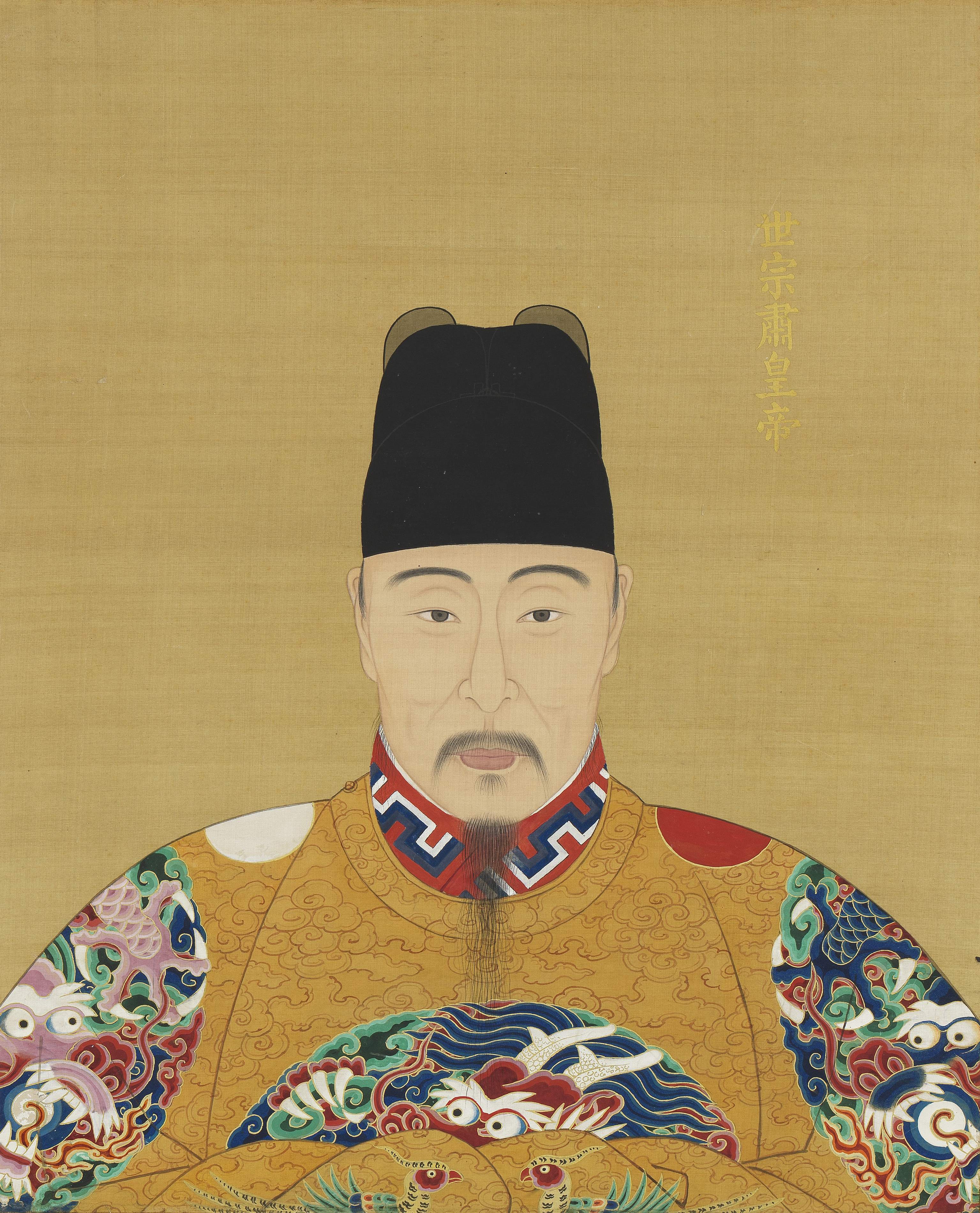 中文（中国大陆）: 作者已经去世超过200年，作品已经进入公有领域。